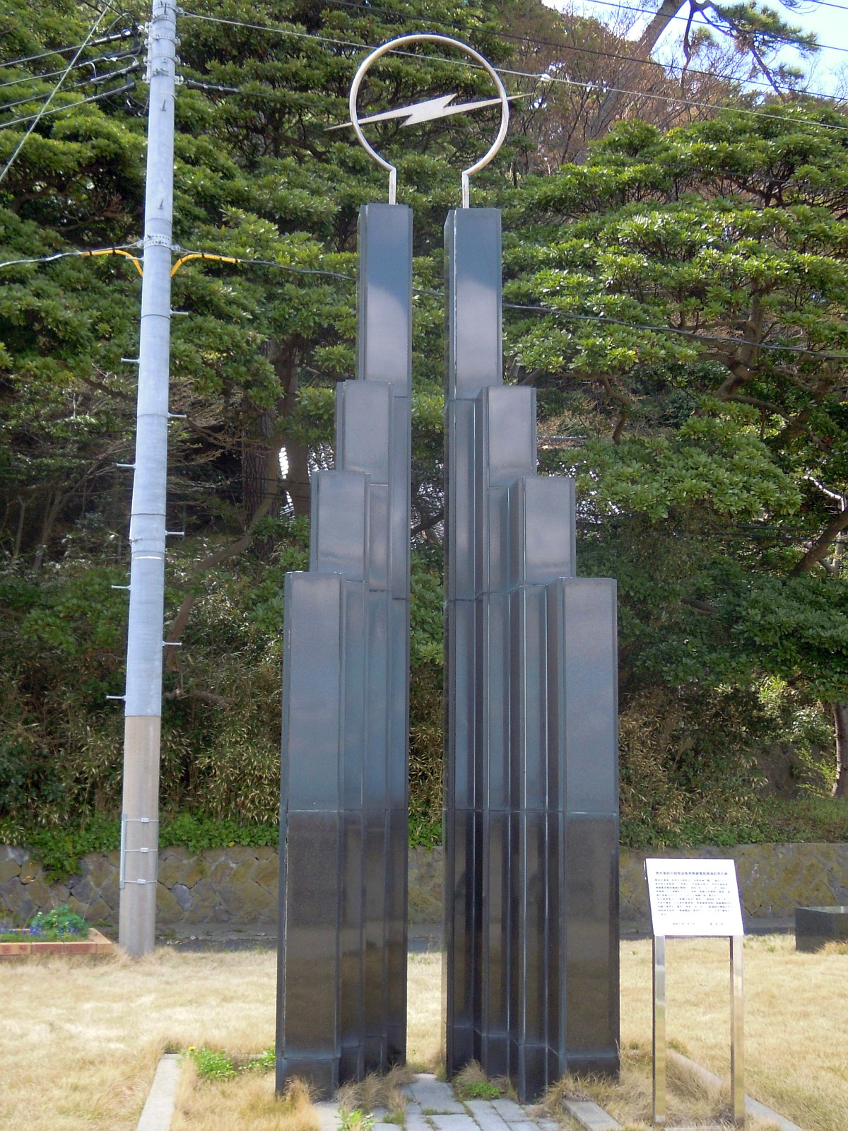 山形県酒田市飛島にある超短波実用無線電話開通記念碑